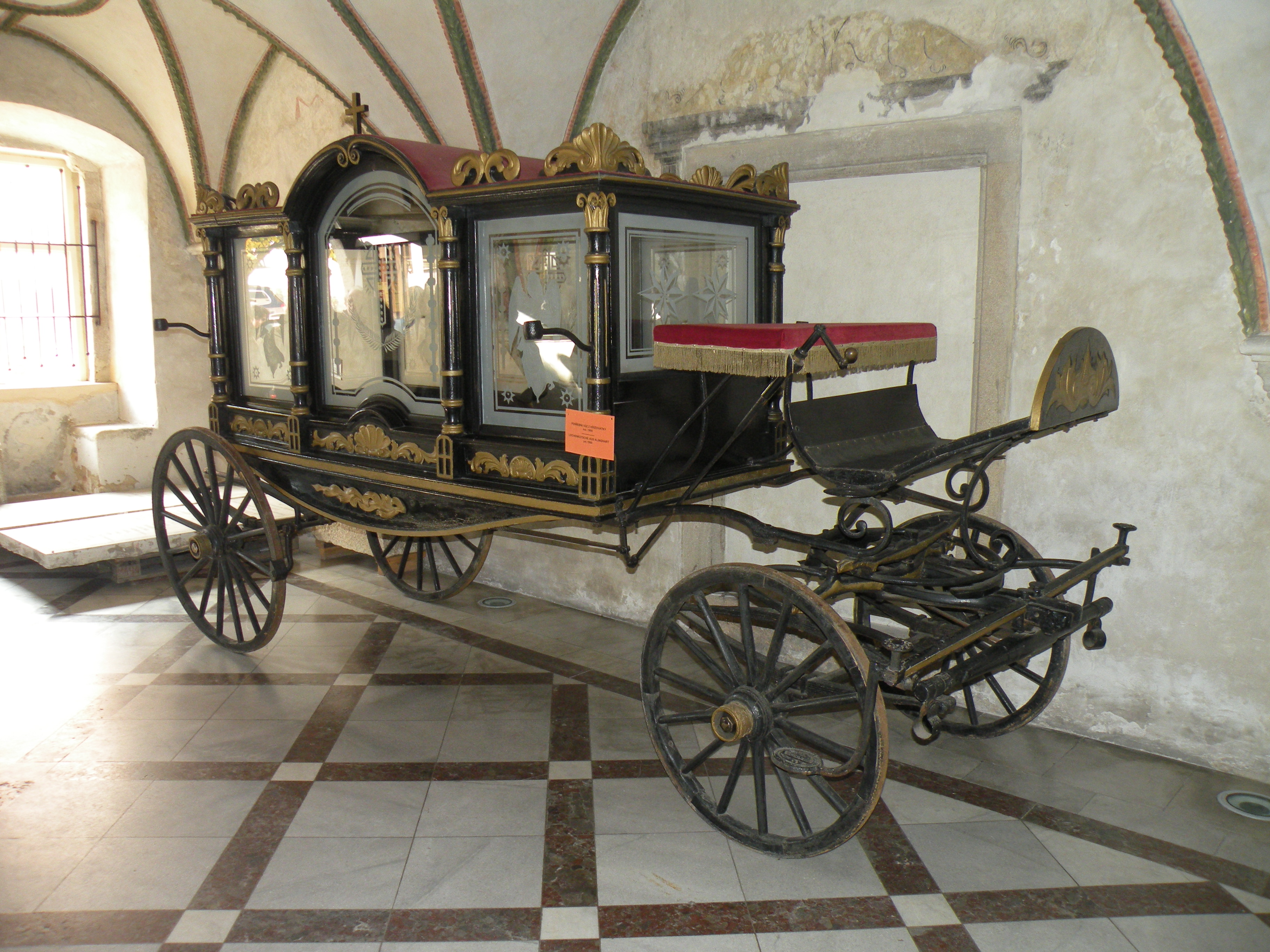 Хеб.Музей.Катафалк